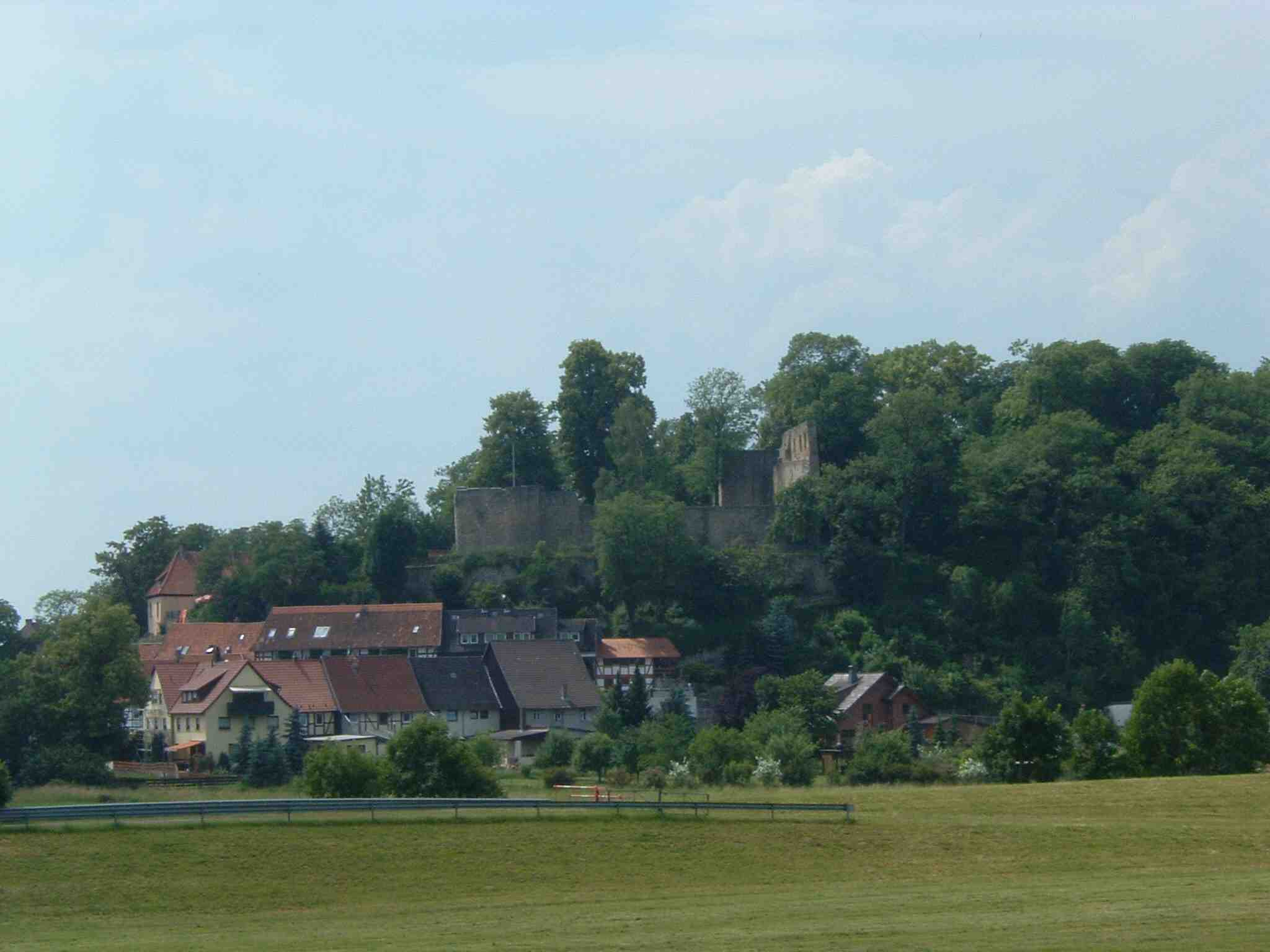 Heldenburg